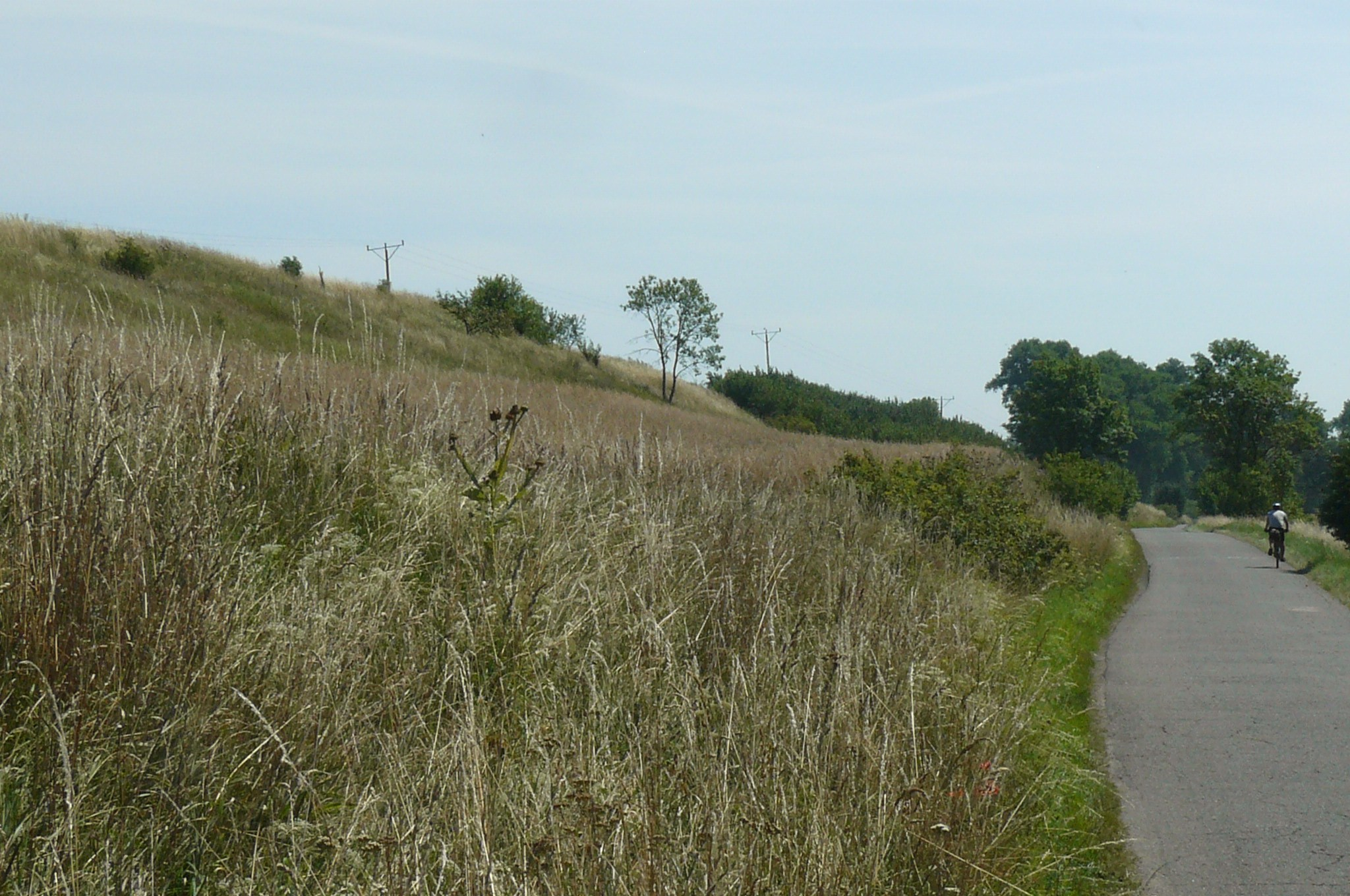 Rezerwat przyr. Brodogóry nad Miedwiem.